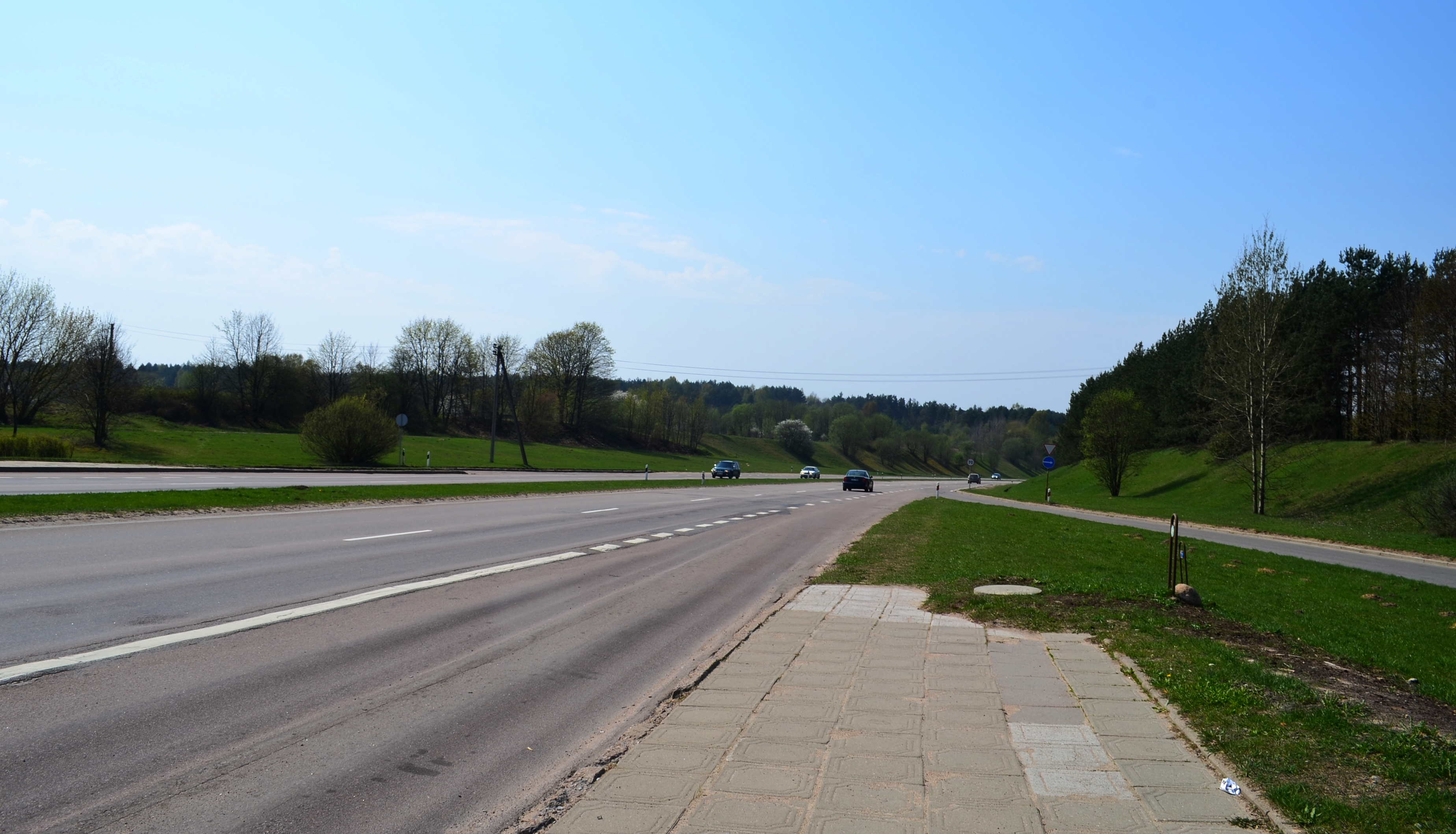 S. Batoro gatvė, jungianti Vilnių su N. Vilnia ties posūkiu į Lyglaukius